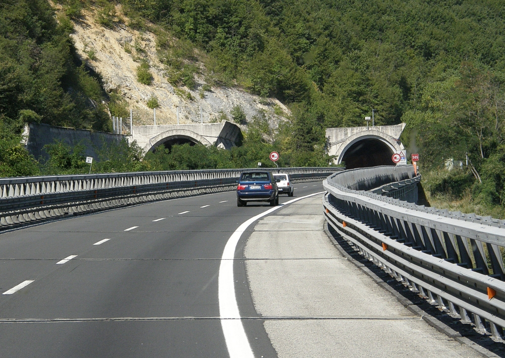 Autostrada A24 vicino Rom